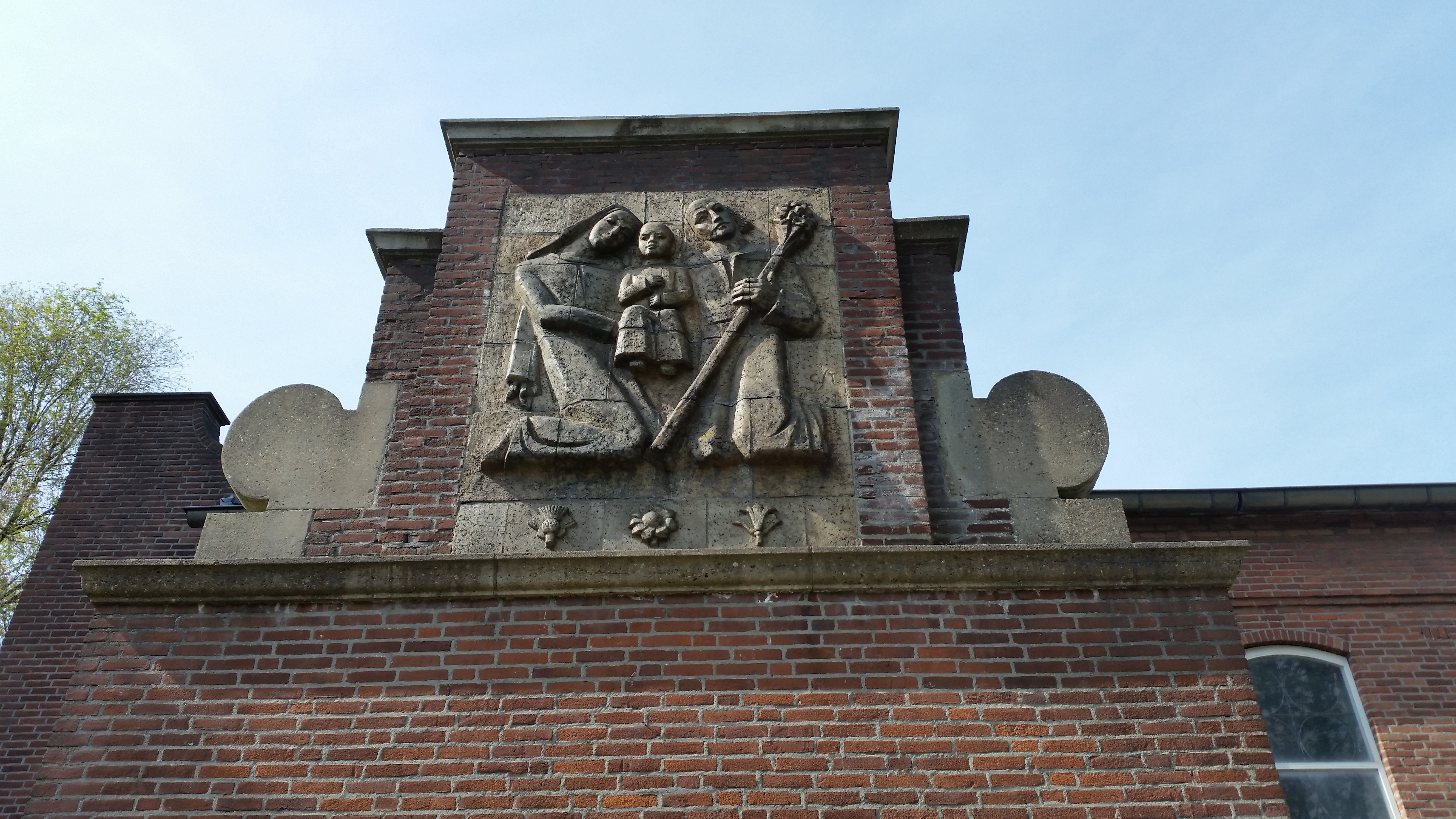 Terrein van de Heilige Familiekerk aan de Zaaiersweg, Watergraafsmeer; gemeentelijk monument.